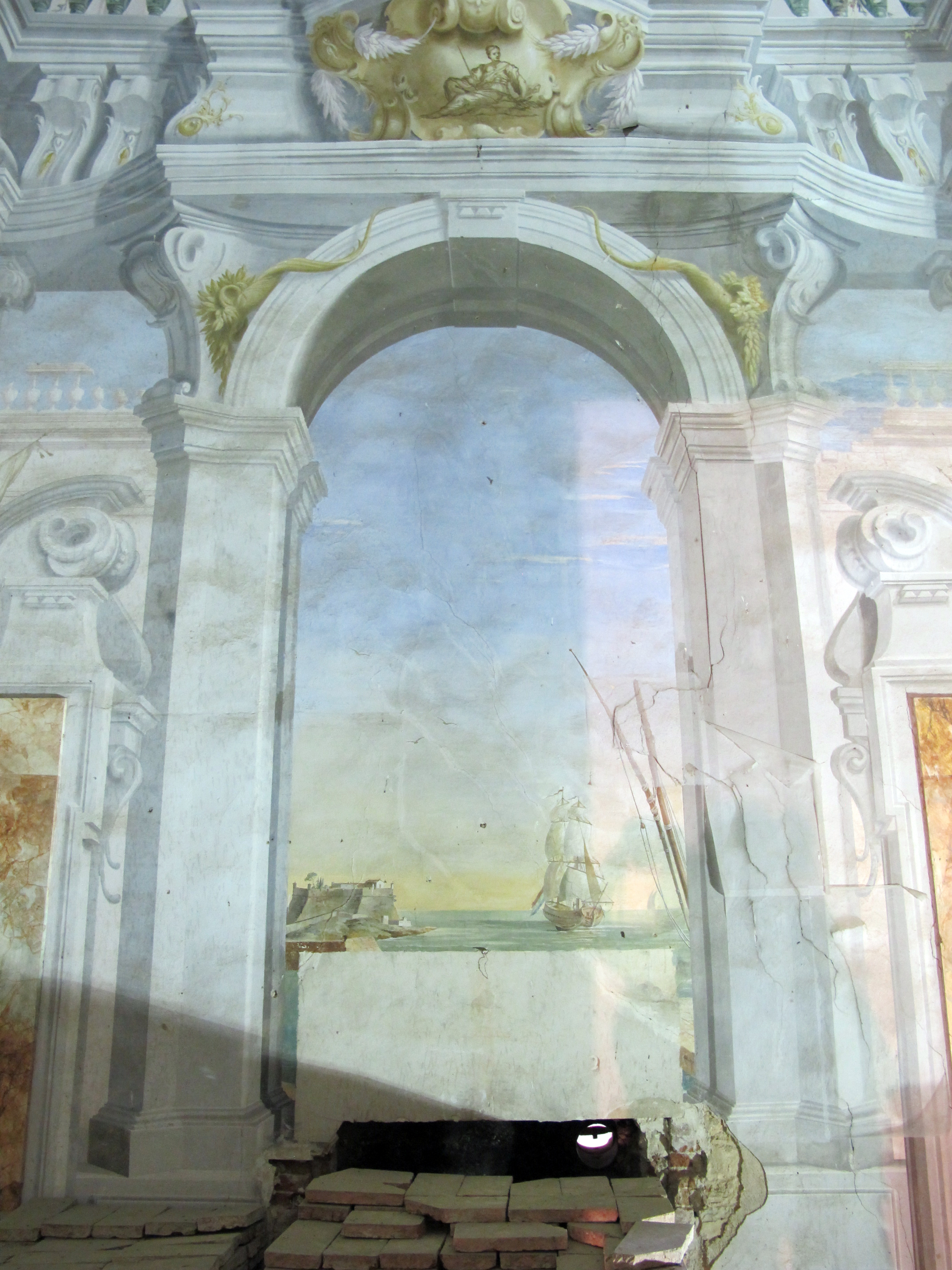 Villa del Barone (Montemurlo)